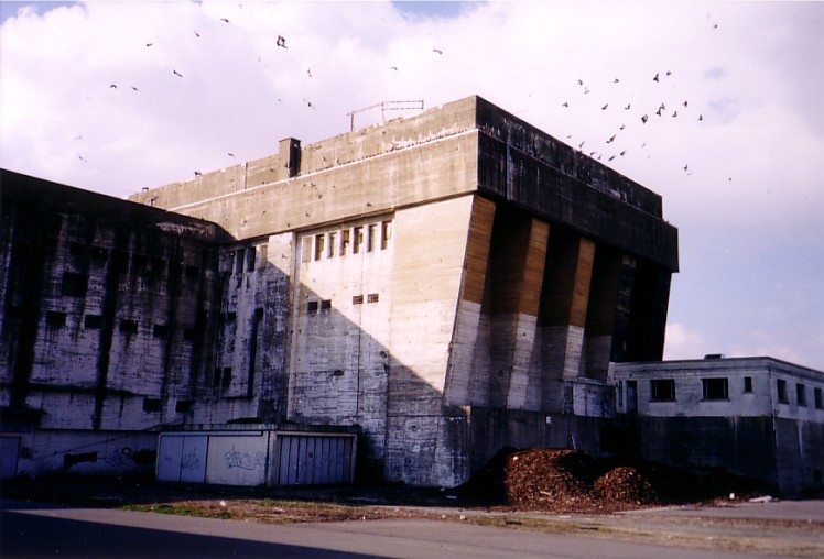 U-Boot-Bunker in La Rochelle